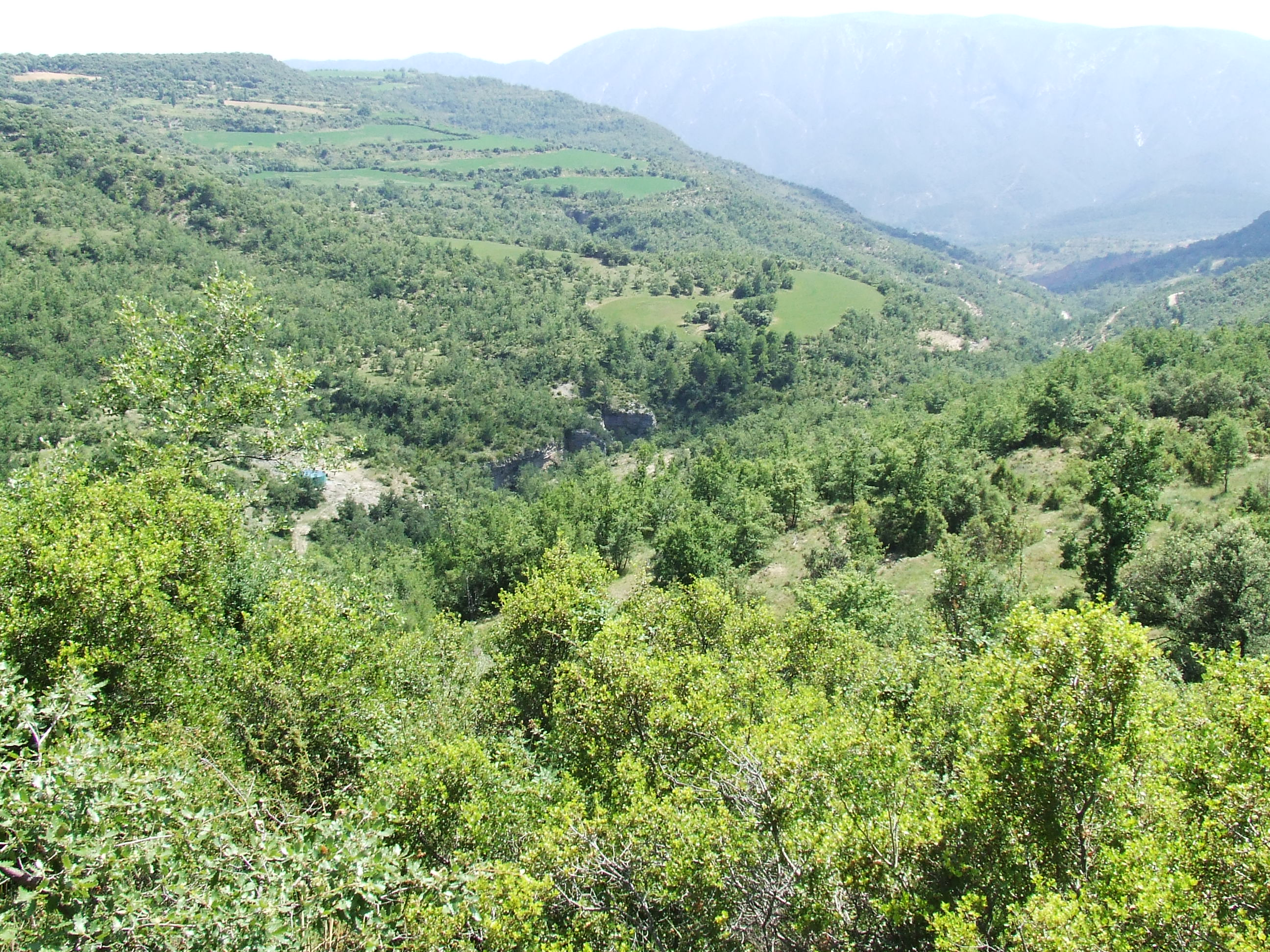 Vedat de Farmicó (Miravet, Mur, Castell de Mur, Pallars Jussà)